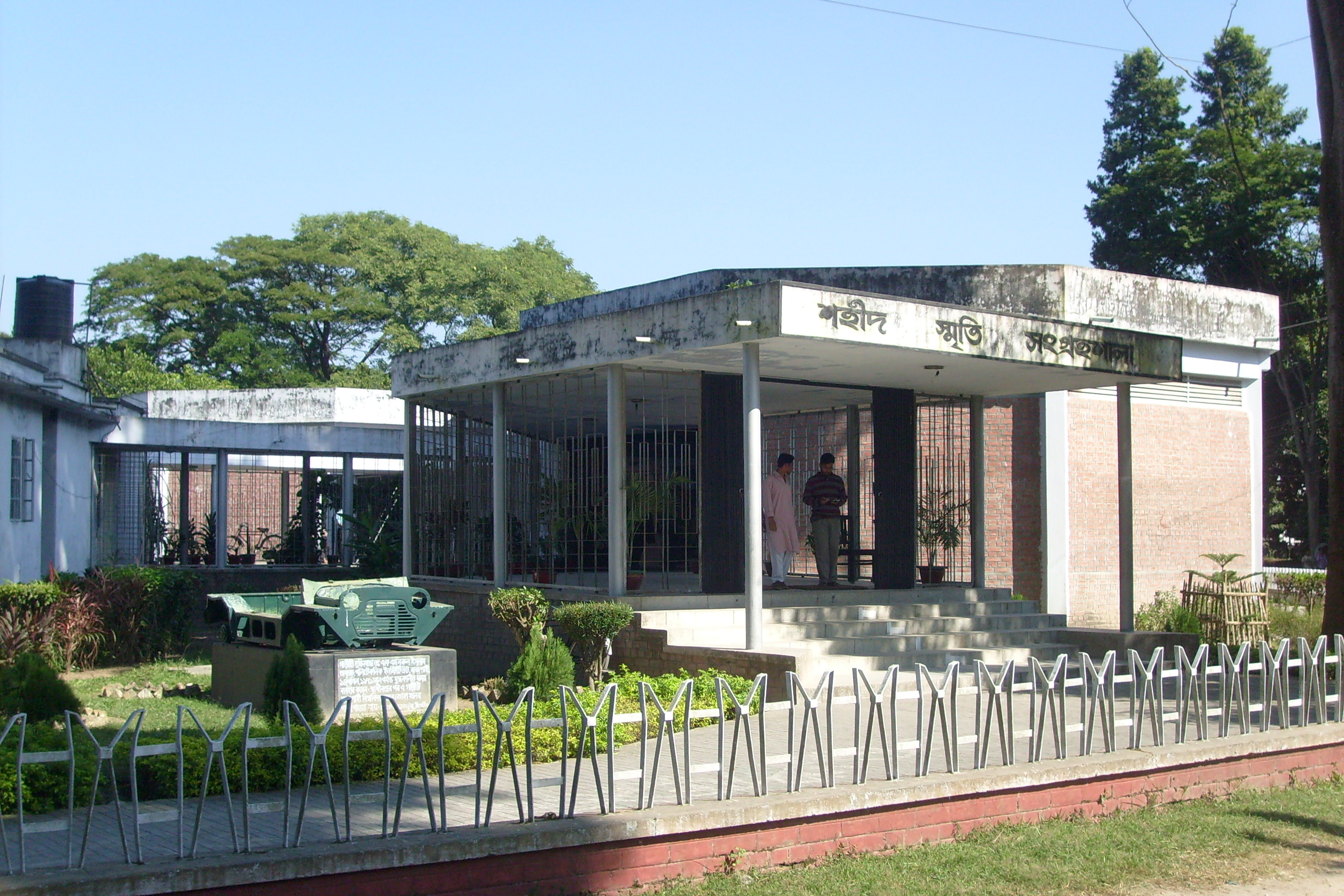 Rajshahi University, Rajshahi, Bangladesh